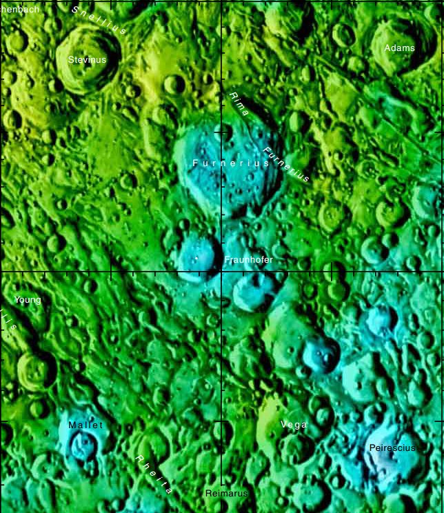 Cráter lunar Fraunhofer. Localización. (Imagen LRO)